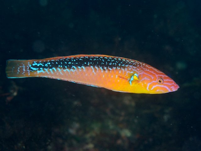 オトヒメベラ Pseudojuloides elongatus